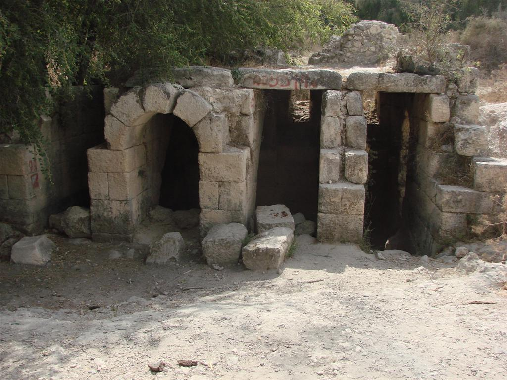 בית הקשתות - פארק קנדה